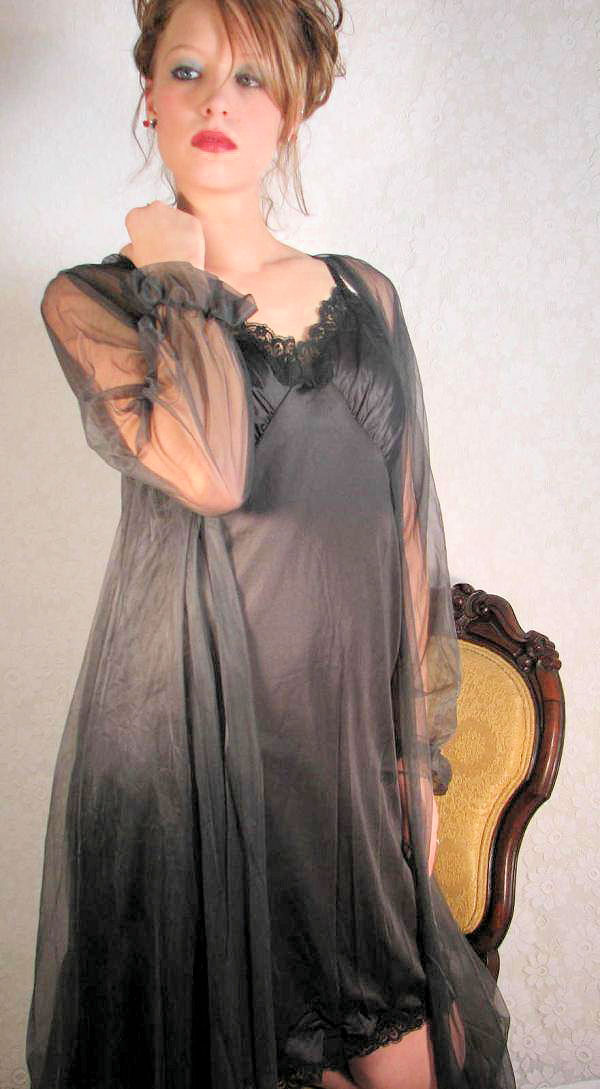 Own work